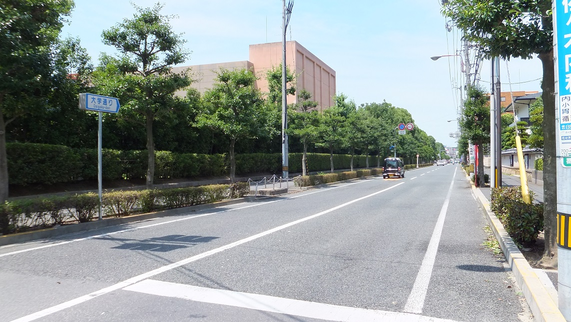 香川県高松市の大学通り